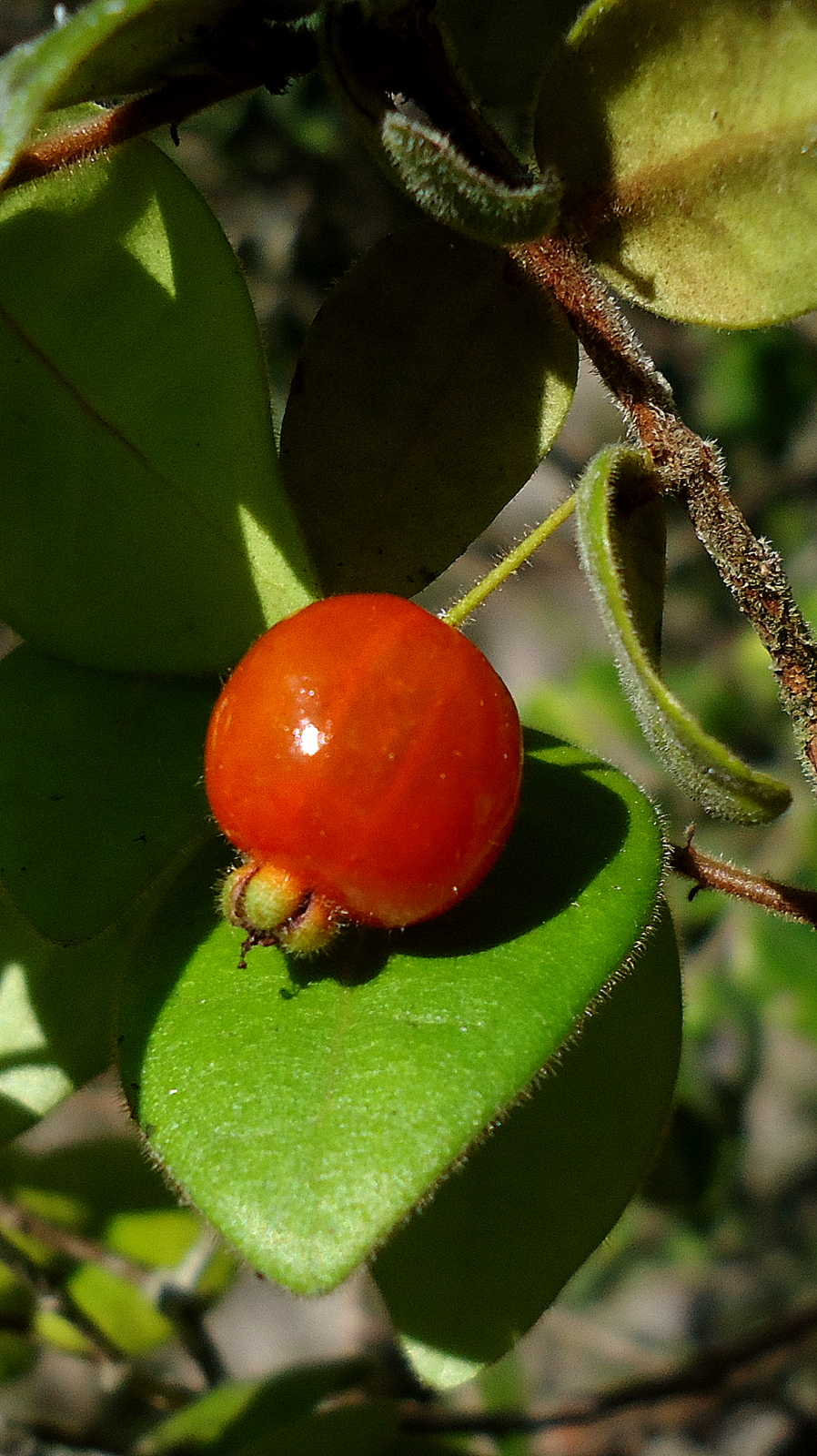 Eugenia hirta O. Berg